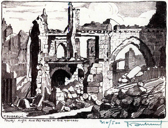 rue de la scellerie, église des augustins XIVe siècle, auteur Ferdinand Dubreuil, tours 1940 archives ABMVT